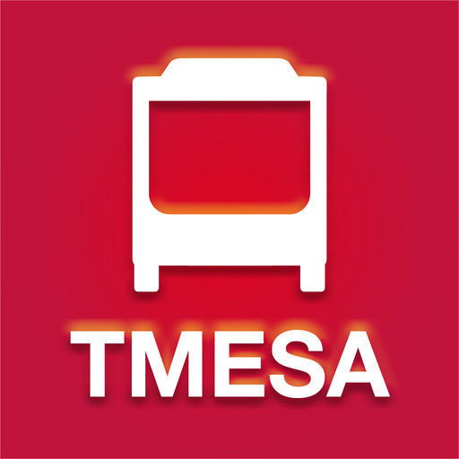 Logo bus Terrassa, TMESA